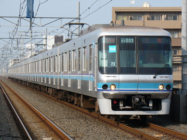 東西線用07系車両